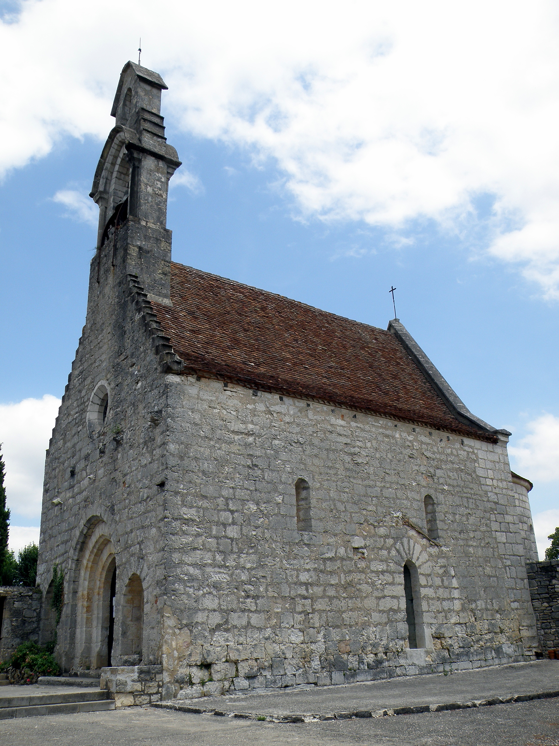 Rocamadour (Lot). Hameau de l'Hospitalet. Chapelle.